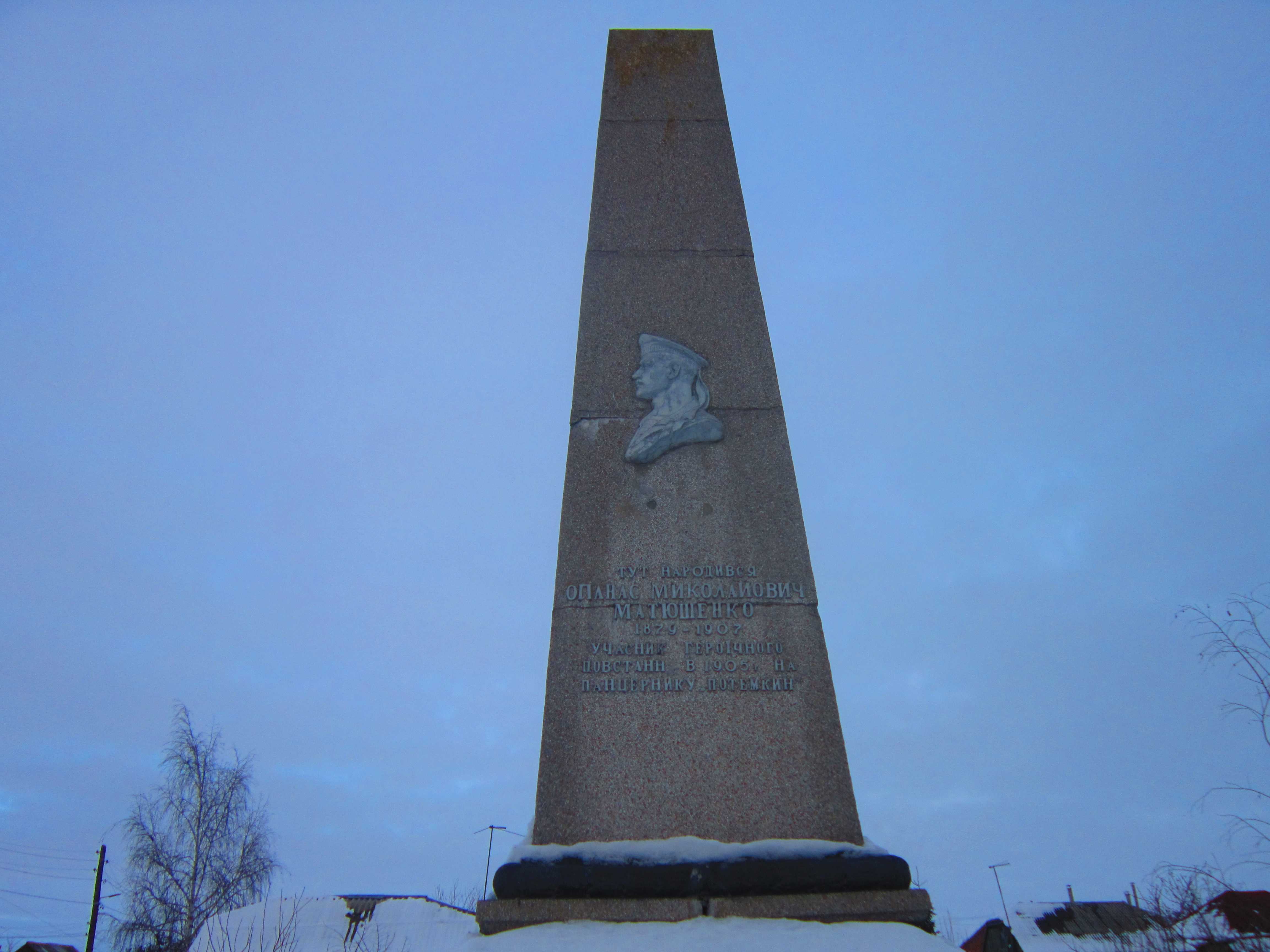 Пам'ятник Матюшенку О.М., одному з керівників повстання на броненосці “Потьомкін” у червні, Дергачі, вул. Матюшенка